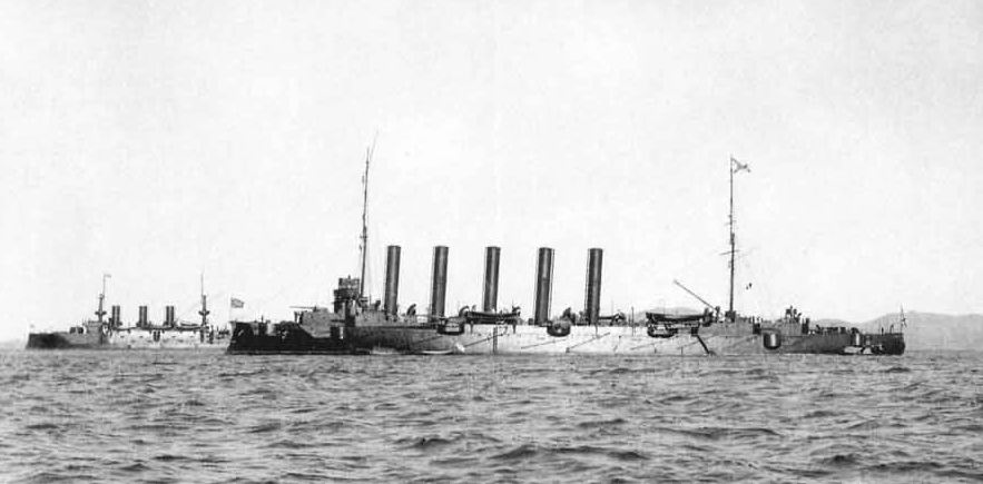 Крейсер "Аскольд" на рейде Порт-Артура в 1904 (на заднем плане - броненосец "Пересвет")